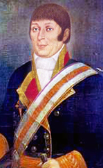 Retrato a cor do explorador galego, Francisco Antonio Mourelle, (ca 1750) - 1820).